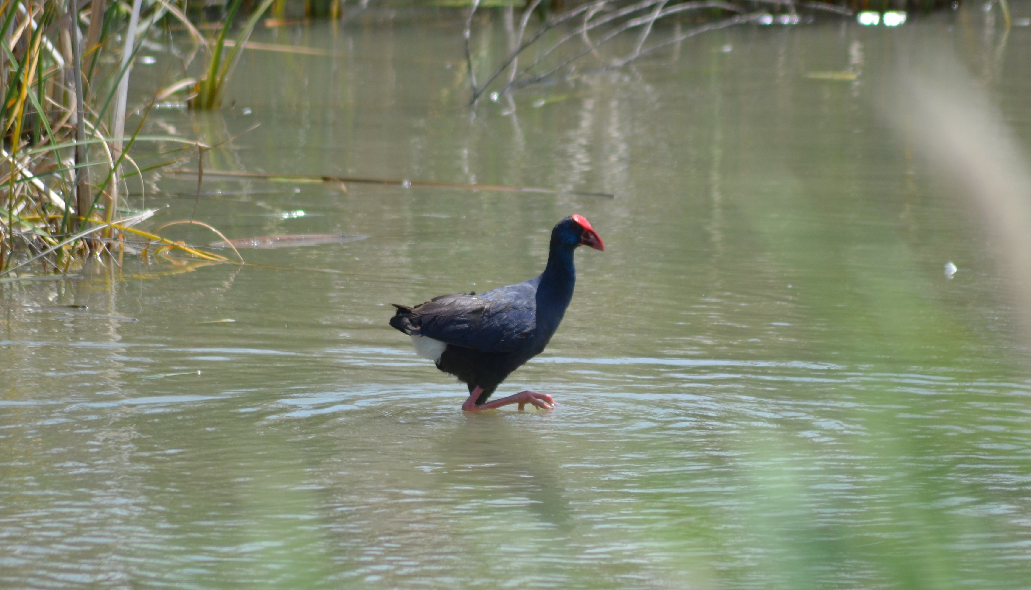 Calamon común fotografiado en junio 2014 en Ibars d'Urgell Catalunya.